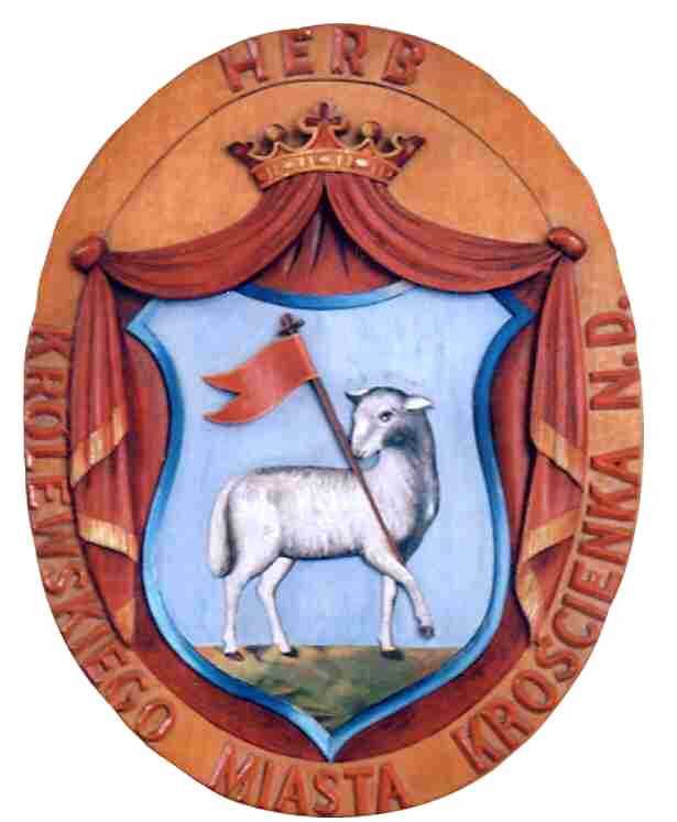 Herb Krościenka nad Dunajcem